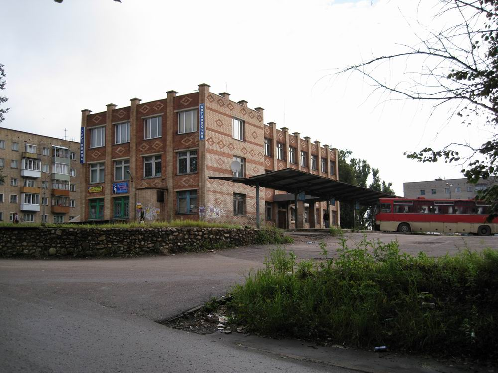 Автовокзал г. Сафоново